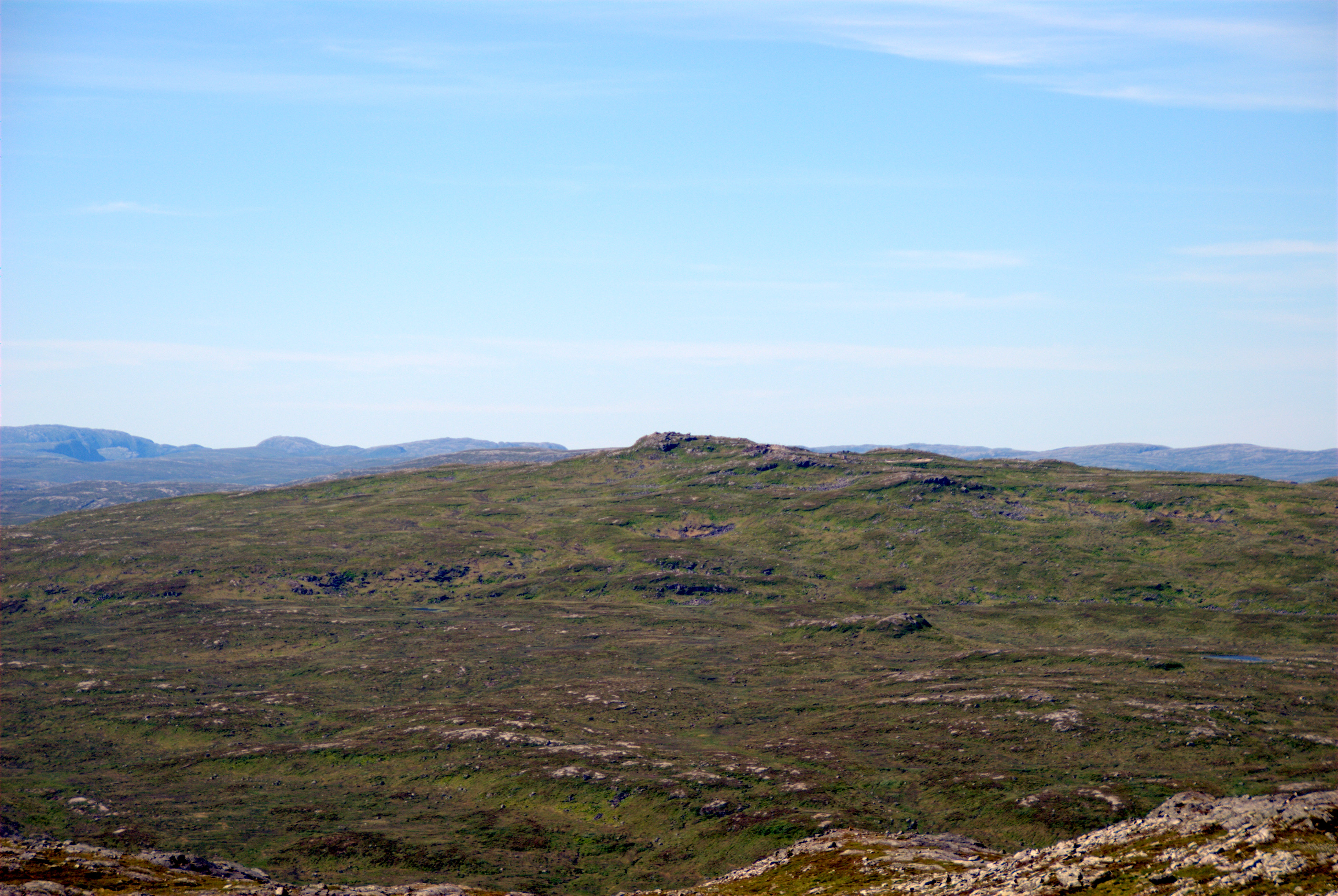 Dåpma (644 moh) sett fra Finnvollheia. Dåapma med sin topp danner grensepunkt mellom kommunene Roan og Åfjord i Sør-Trøndelag og Namdalseid i Nord-Trøndelag. Dåpma er høyeste punkt i Roan kommune.